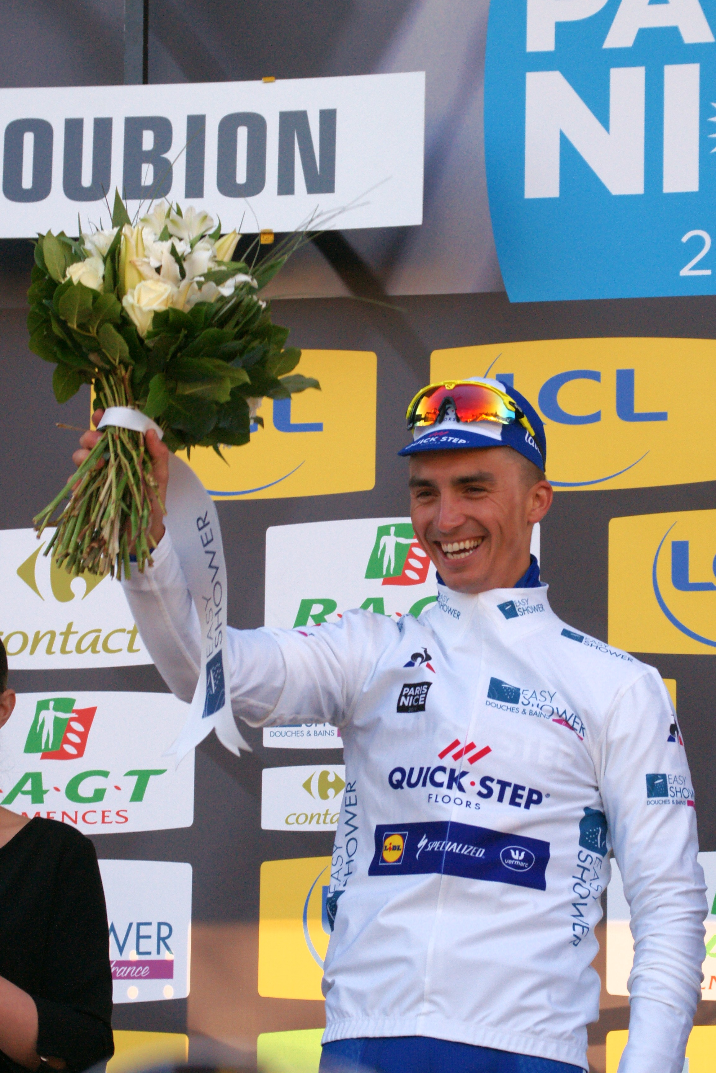 Julian Alaphilippe blanc Roubion Paris-Nice 2017